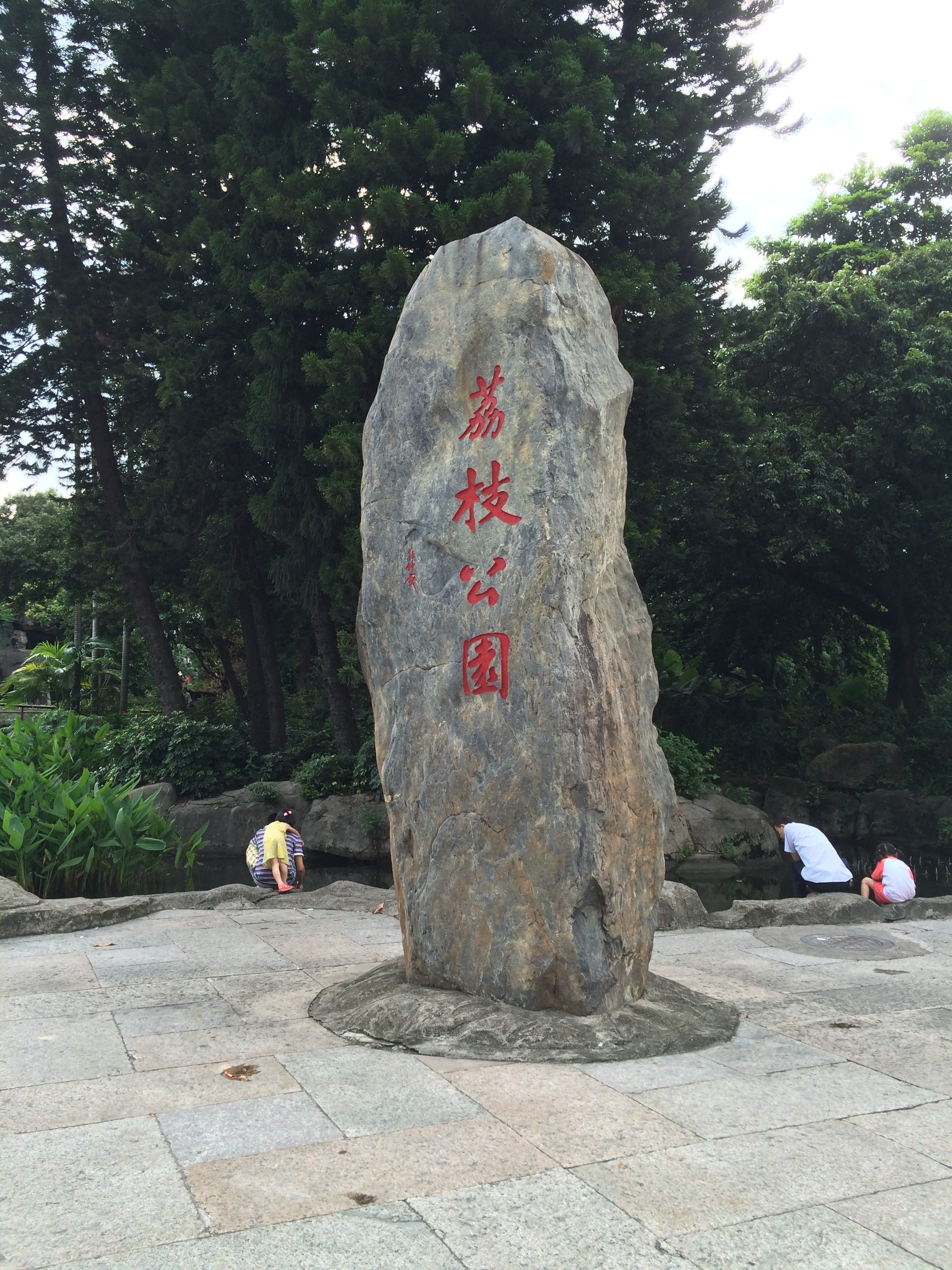 石碑